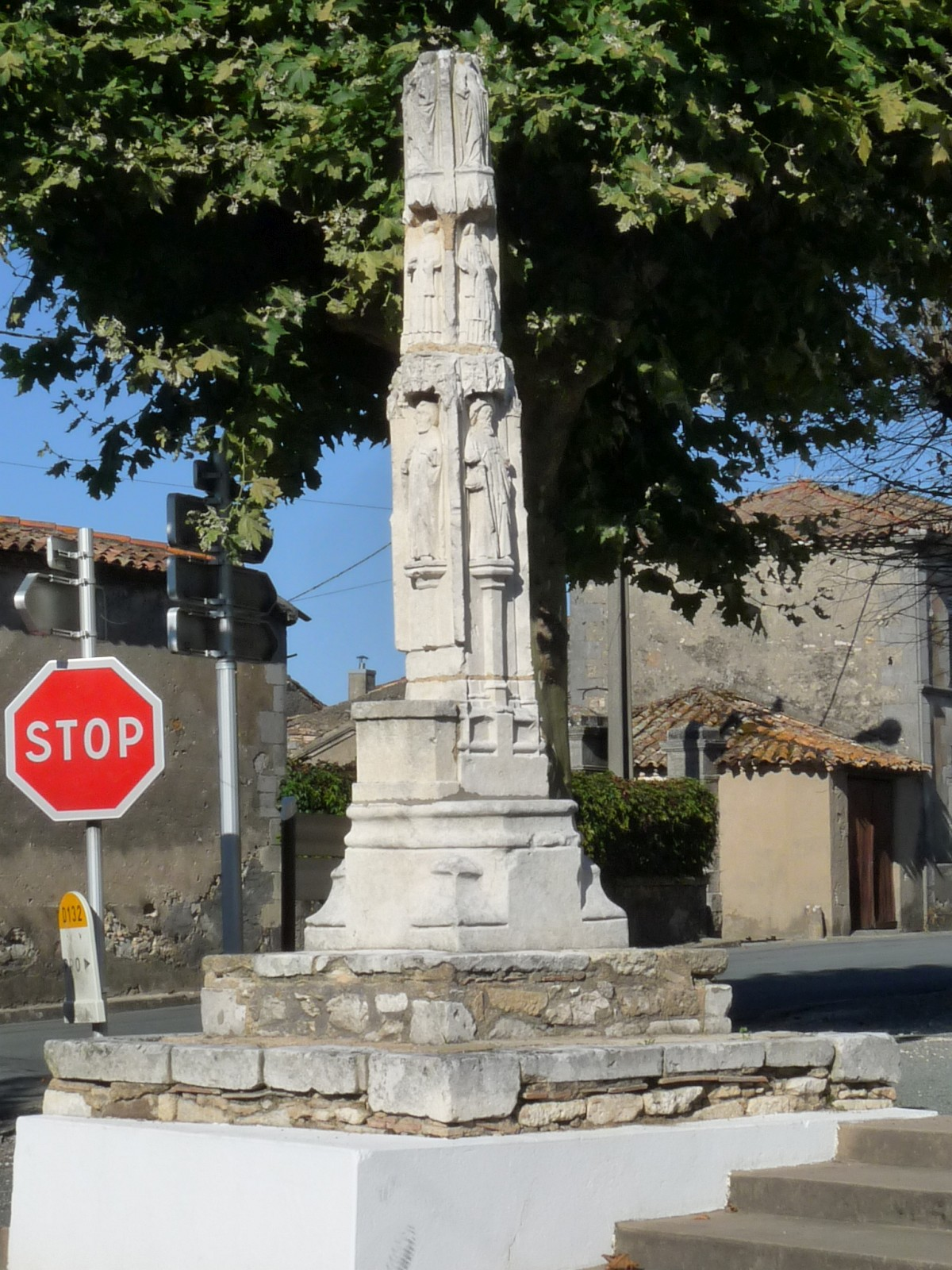 Ancienne croix de chemin, place de l'église, Marcillac, Gironde, France